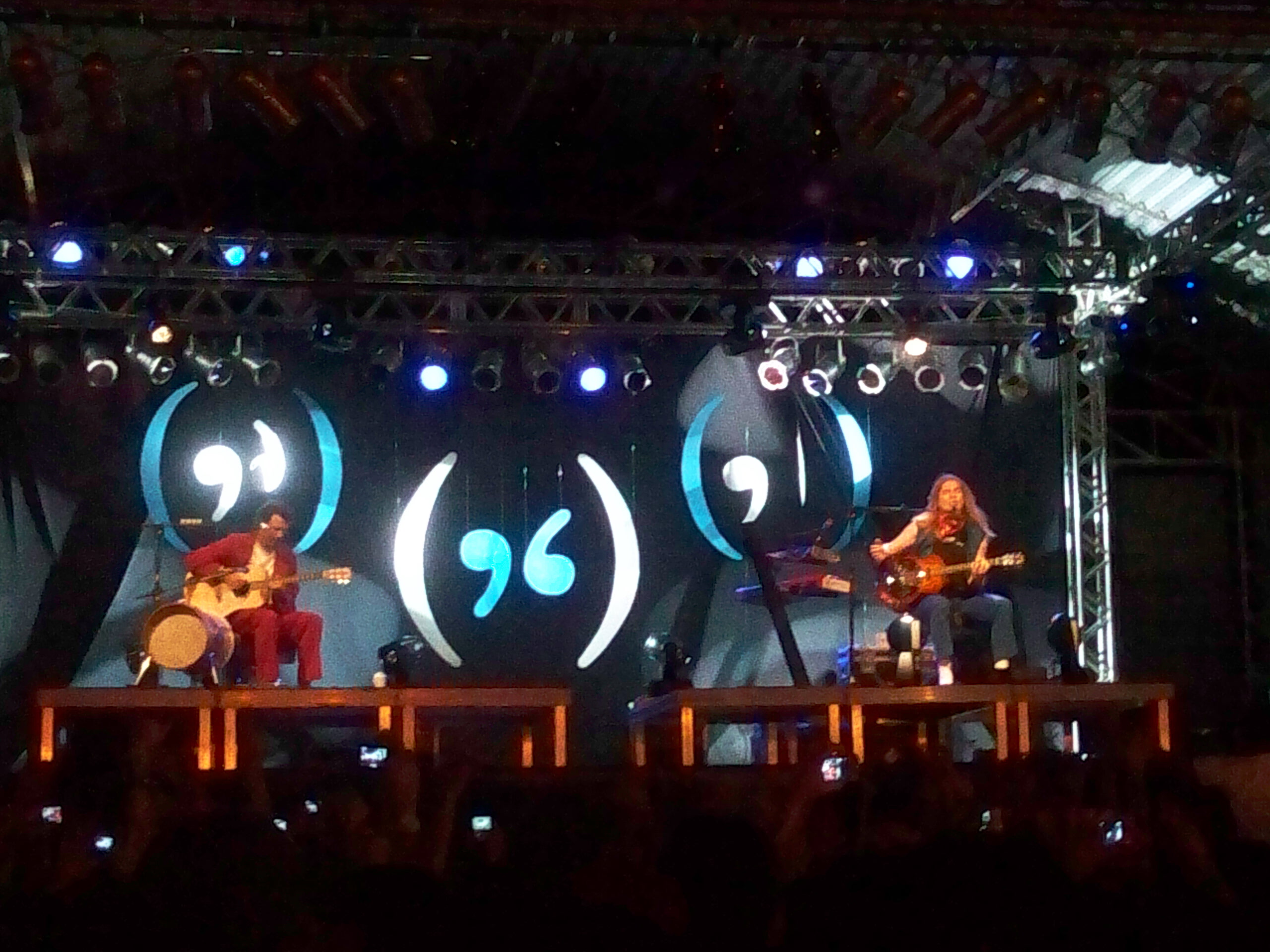 Show do Pouca Vogal na cidade de Irecê (Bahia)